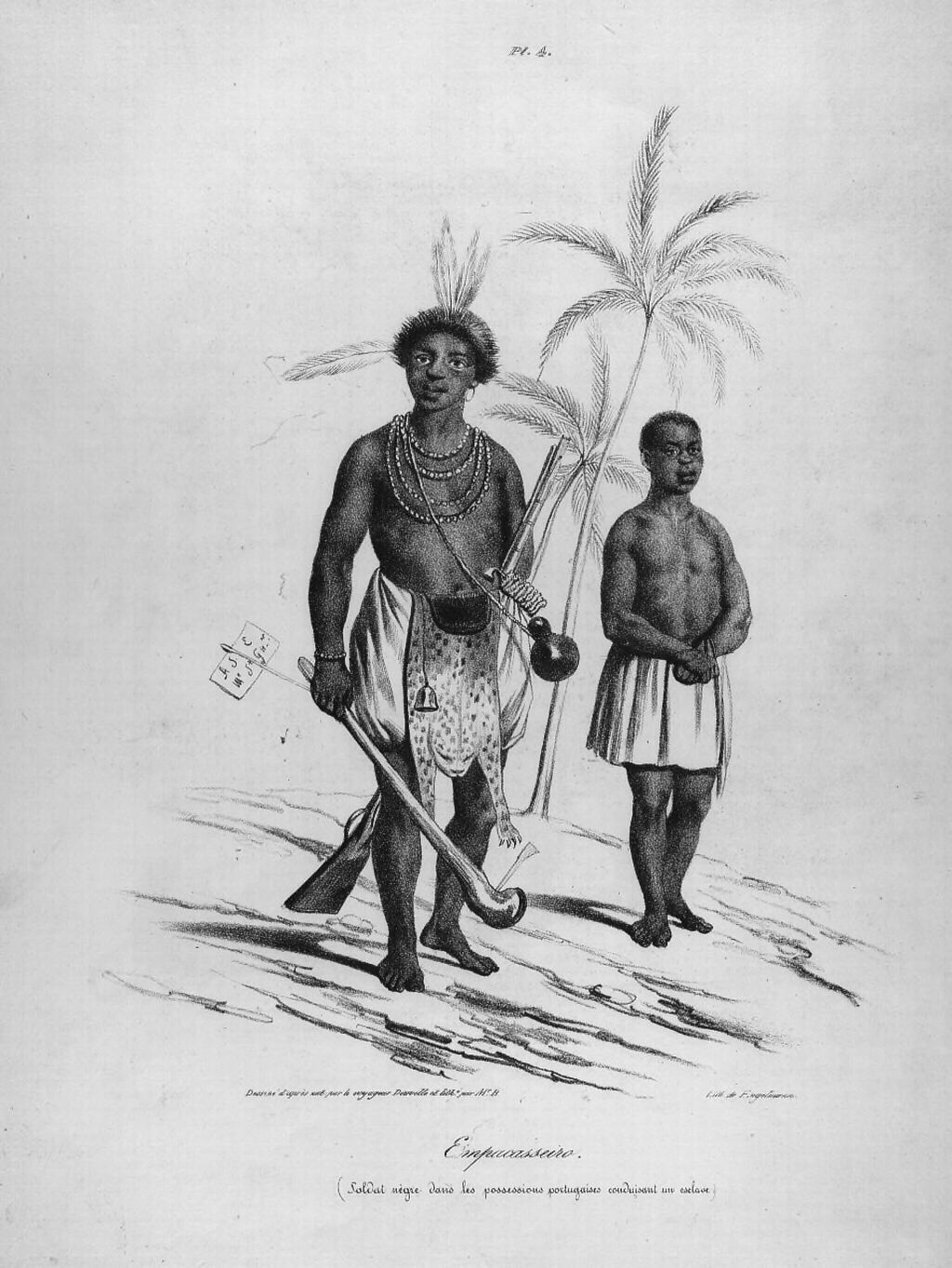 Estampe représentant un soldat des possessions portugaises d'Afrique, conduisant un esclave, publiée en 1833. Auteur(s) : Douville, Jean-Baptiste. Dessinateur Diaz de la Pena, Narcisse Virgile (1807-1876). Graveur Boulanger, Louis (1806-1867). Graveur Engelmann, Godefroy (1788-1839). Graveur Douville, Jean-Baptiste. Auteur du texte Titre(s) : [Illustrations de Atlas du voyage au Congo et dans l'intérieur de l'Afrique équinoxiale dans les années 1828, 1829 et 1830] [Image fixe numérisée] / Douville, dess. ; Diaz, Boulanger, De Engelmann, grav. ; J.B. Douville, aut. du texte Référence du document : planche n°4 Type de ressource électronique : Publication : Paris : J. Renouard, 1832 Description matérielle : 20 est. : lithogr. : n. et b. ; 23,5 x 30 cm et moins Note(s) : Acq. : Museum National d'Histoire Naturelle Source : Dans"Atlas du voyage au Congo et dans l'intérieur de l'Afrique équinoxiale dans les années 1828, 1829 et 1830"/ J. B. Douville, Paris, J.Renouard, 1832. (Réserve DT 611.2 D 74 Atlas ex.2 M). L'ouvrage comprend 20 planches (1832). Réserve Bibliothèque Musée de l'Homme. Musée de l'Homme Sujet(s) : Congo -- Descriptions et voyages -- Afrique -- Descriptions et voyages Domaine(s) : Ethnologie ; Typologie : imagerie du livre Notice n° : FRBNF38495420